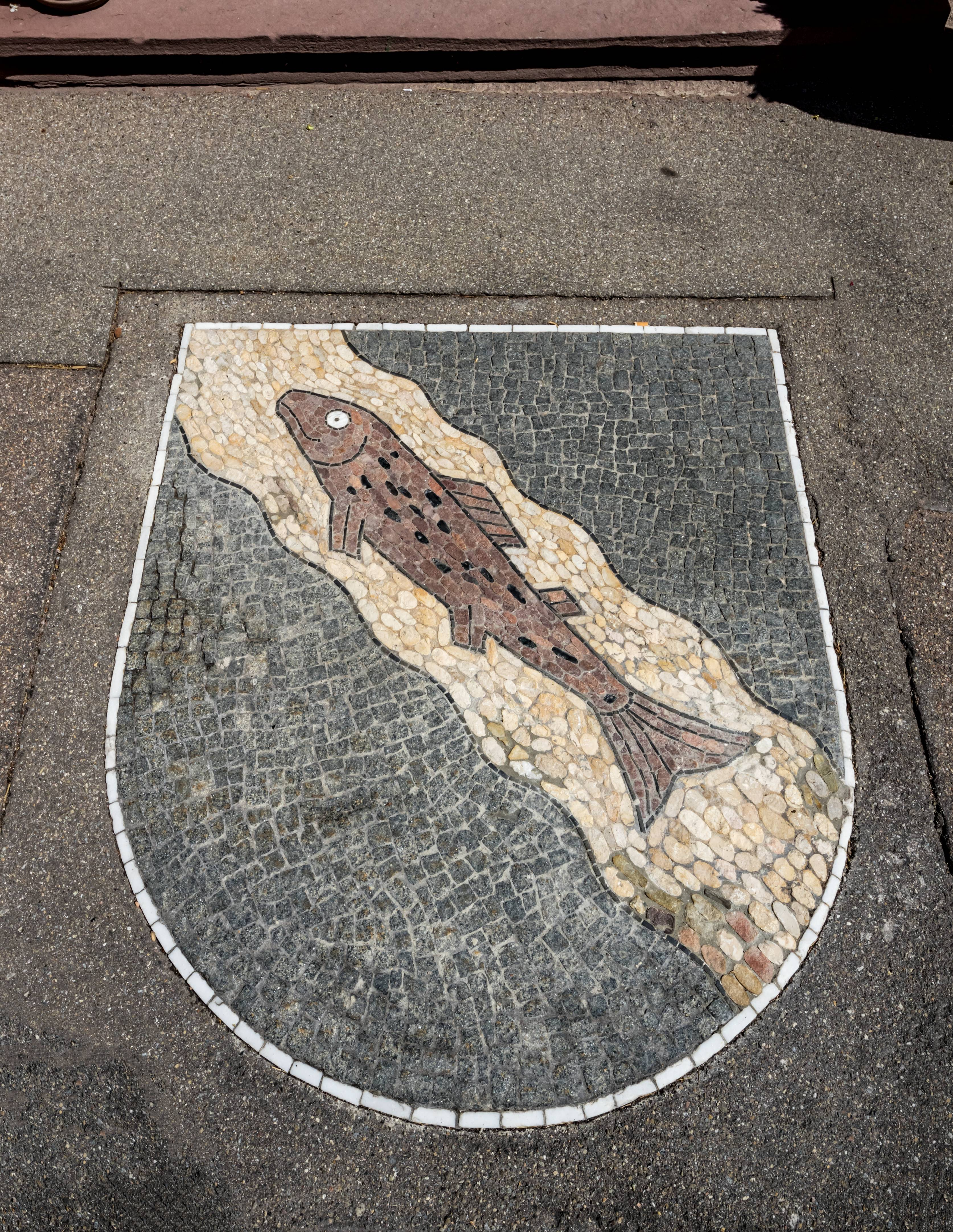 Bilder aus Vöhrenbach